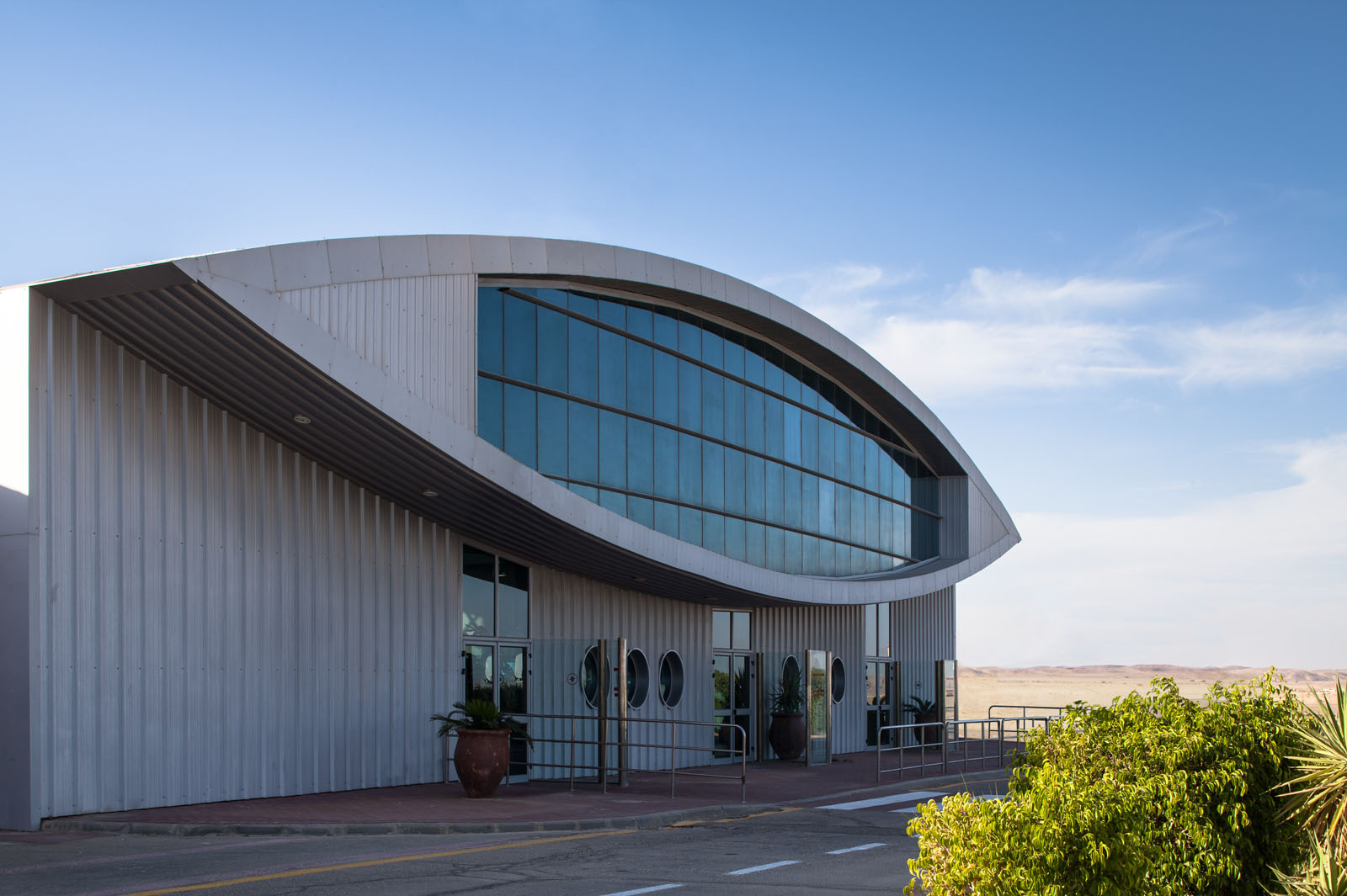 טרמינל נוסעים יוצאים שדה התעופה עובדה